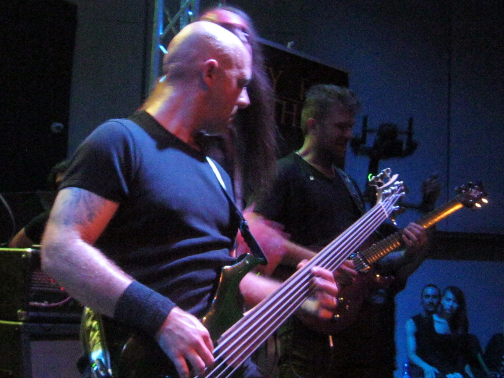 Prey For Nothing Vs Scardust - Metal Fight 02.06.16, Israel